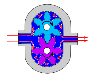 popis pracovních fází zubového čerpadla - fáze 3.